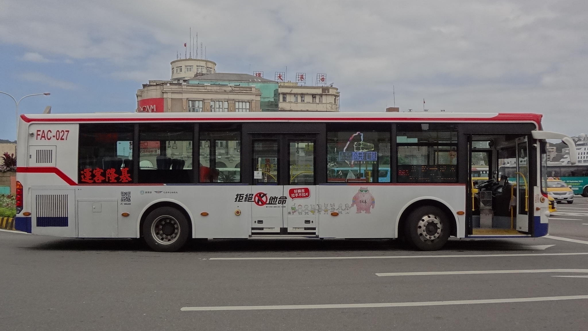 基隆客運2013年KINGLONG KL6112U1大客車FAC-027右側外觀。